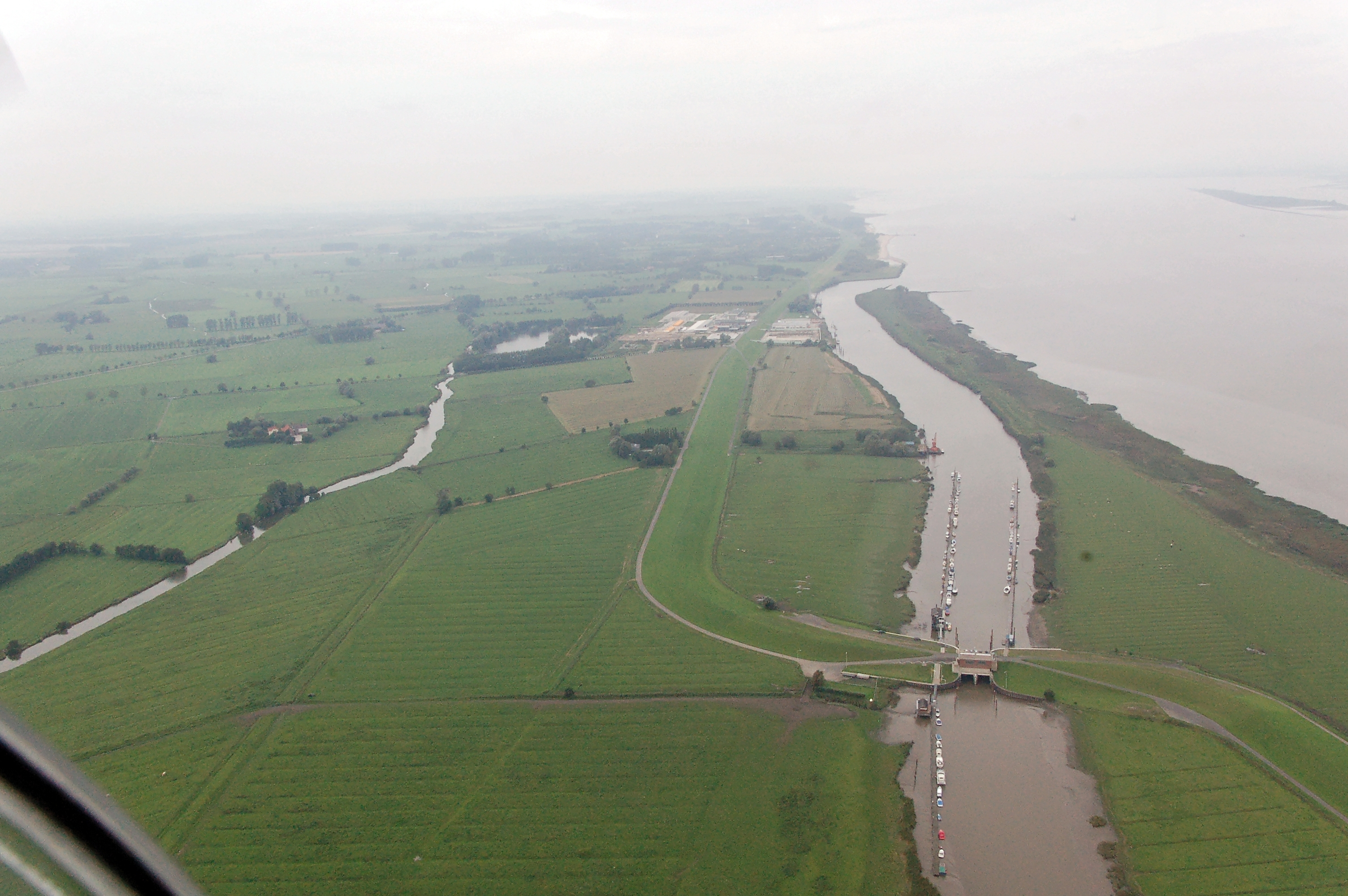 Impressionen Fotoflüge September 2011 (CPB); Gemeindegebiet Drochtersen mit Krautsander Binnenelbe (links), Kotterbachsee, Ruthenstrom (rechts, nach oben in die Elbe mündend) und Ruthenstromsperrwerk (unten rechts), Landkreis Stade, Niedersachsen, Deutschland Dieses Foto entstand aufgrund eines Projektes, das von Wikimedia Deutschland e. V. gefördert wurde. Im Rahmen des „Community-Projektbudgets“ sollen Luftbilder u.a. von Inseln, Halligen, Sanden und Küstenstädten der deutschen Nordseeküste angefertigt werden. Das Projekt „Fotoflüge“ wurde im September 2011 begonnen.